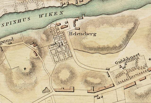 Del av Stockholm 1838 med Heleneberg (Heleneborg) och grindstugan